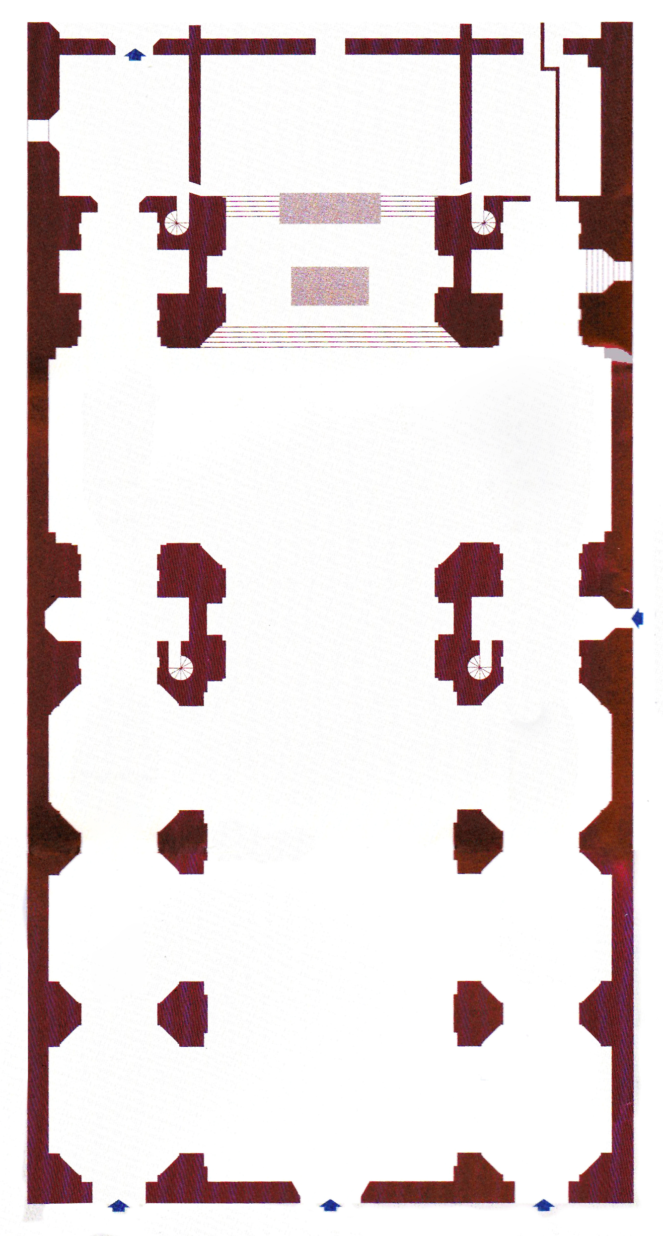 Pianta provvisoria della basilica di San Barnaba a Marino (RM)